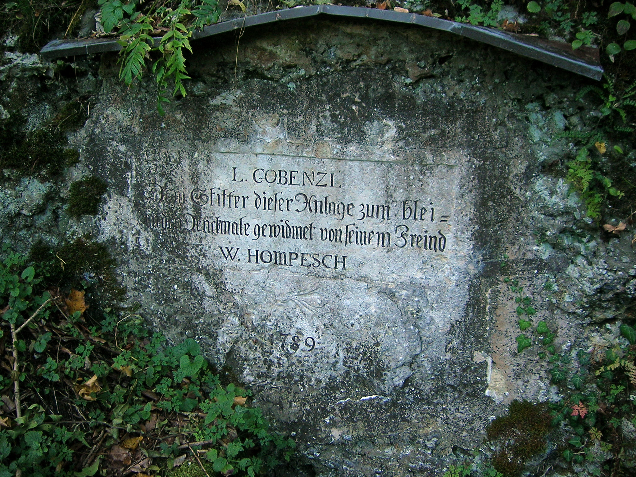 Nähe Ingolstädter Straße 36 (Siechhof) Eichstätt: Gedenkstein für den Stifter des Cobenzlparks, Ludwig von Cobenzl, von seinem Freund Wilhelm von Hompesch, 1789. L. COBENZL Dem Stifter dieser Anlage zum blei- benden Denckmale gewidmet von seinem Freind W. HOMPESCH 1789